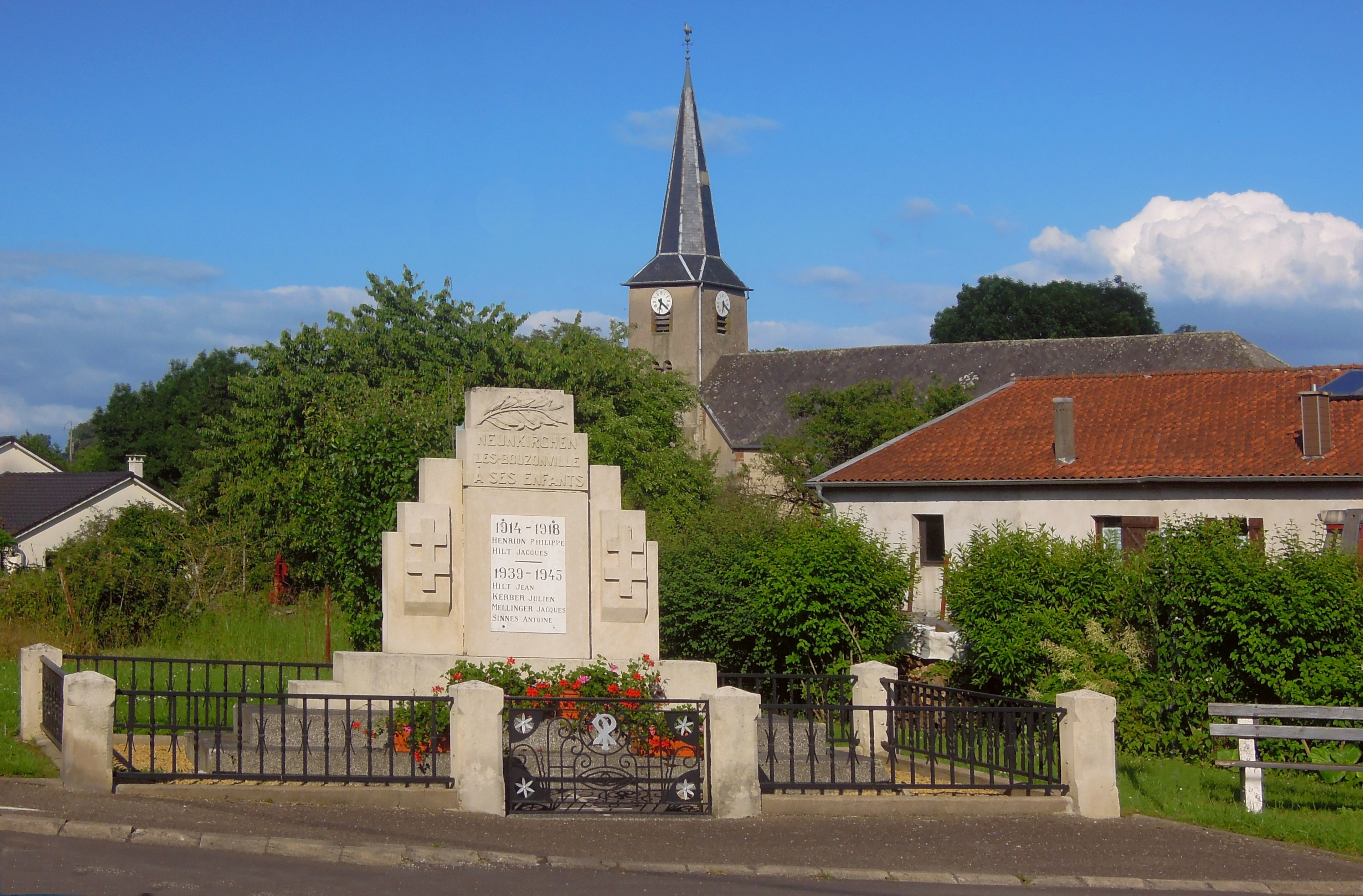 Kriegerdenkmal